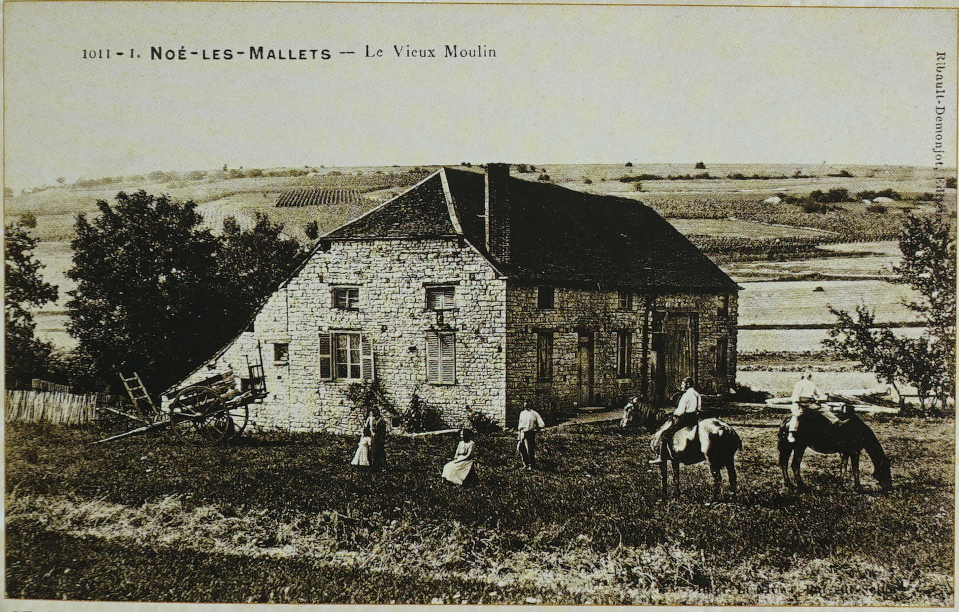 Noé-les-Mallets